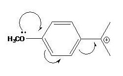 Conjugação cruzada entre o grupo metoxila (substituinte) que estabiliza o carbocátion terciário gerado, proveniente da solvólise do cloreto de t-cumila.